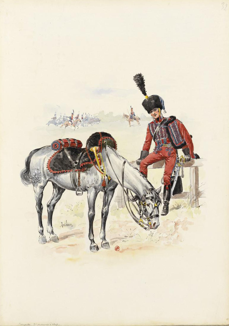 Trompette du 3e Hussards en 1809.